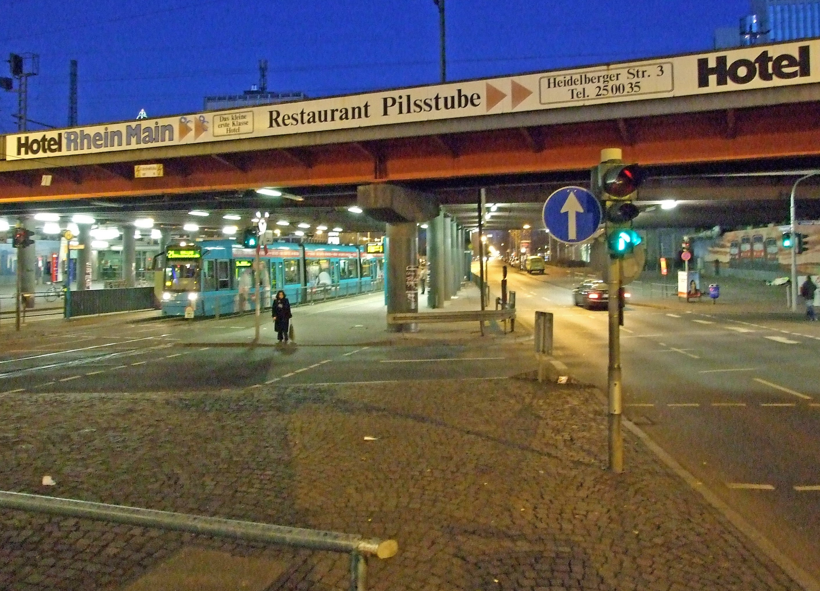 Kreuzungs-Kreisel Galluswarte mit Tram-Haltestelle und Bahnbruecke, Blickrichtung Mainzer Landstrasse, Richtung Hauptbahnhof